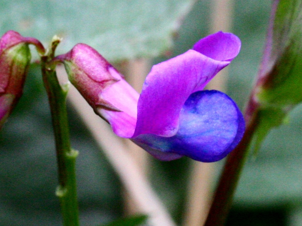 Lathyrus_vernus (Cicerchia primaticcia) Località Passo Duran, Agordo (BL), 1598 m s.l.m.